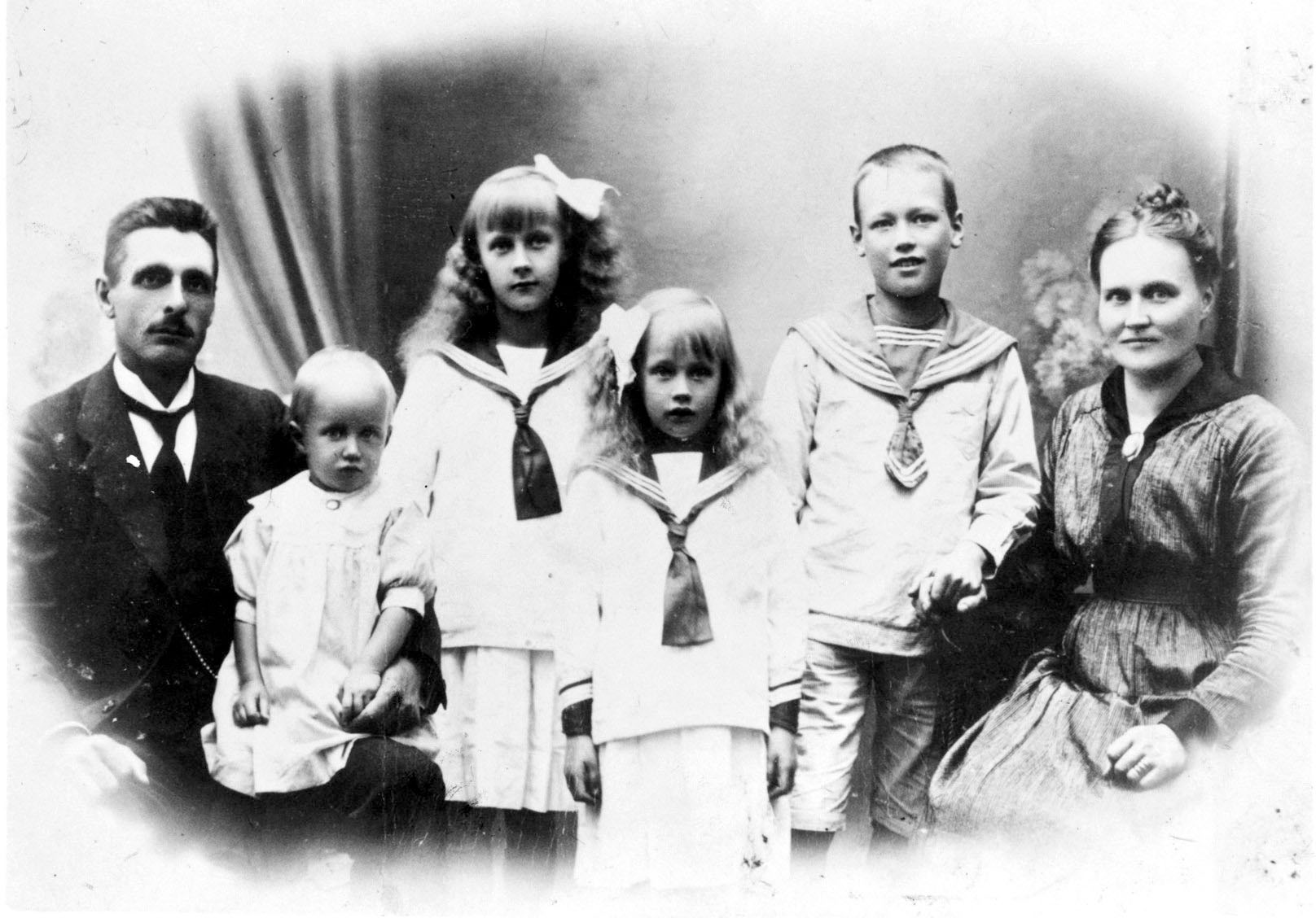 Barndomsbild på Astrid Lindgren med sin familj.